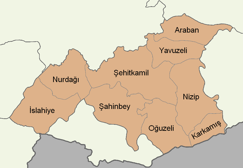 Gaziantep'in ilçelerini gösteren harita